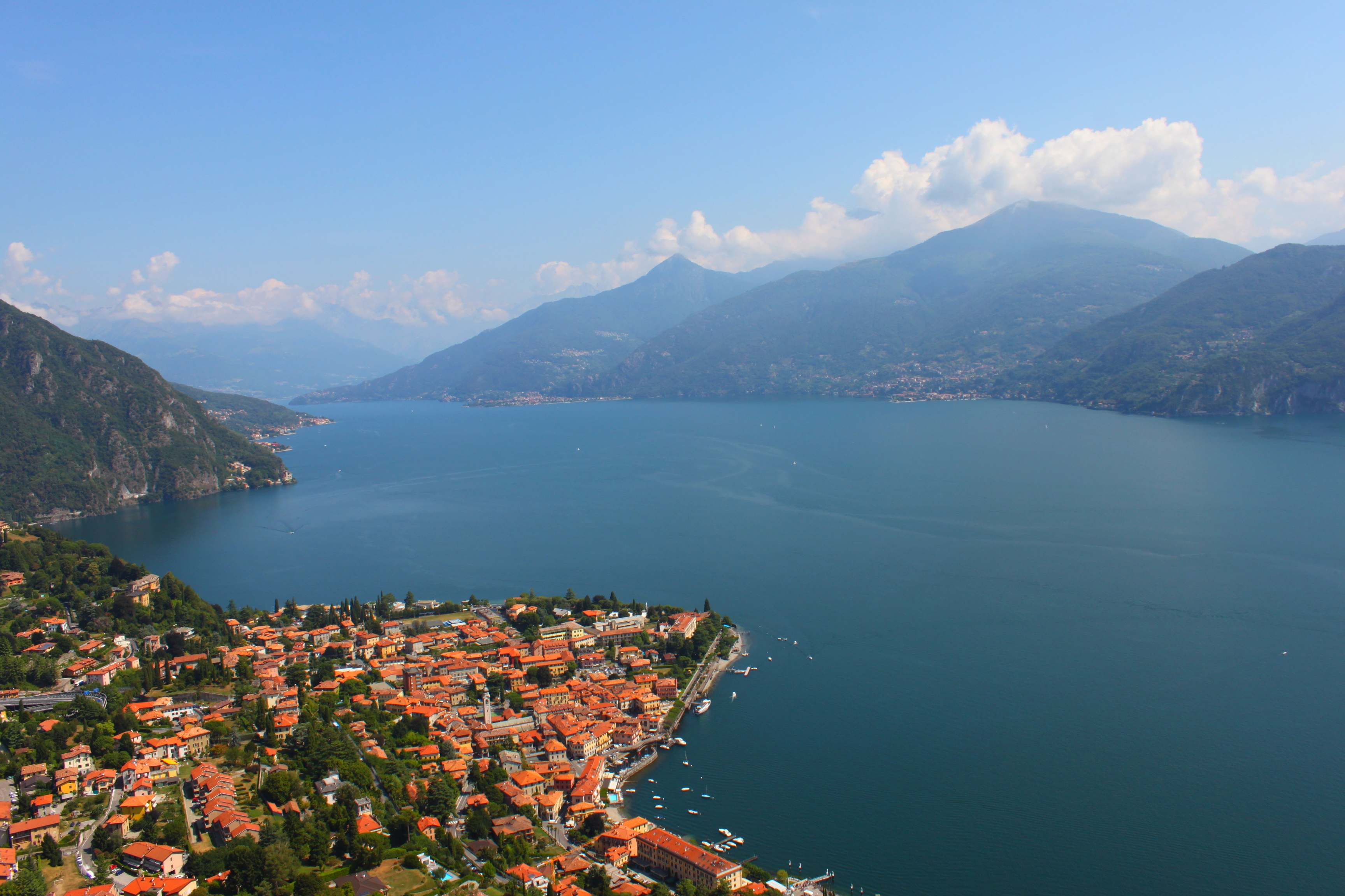 Blick auf den nördlichen Comer See, von La Crocetta bei Menaggio aus